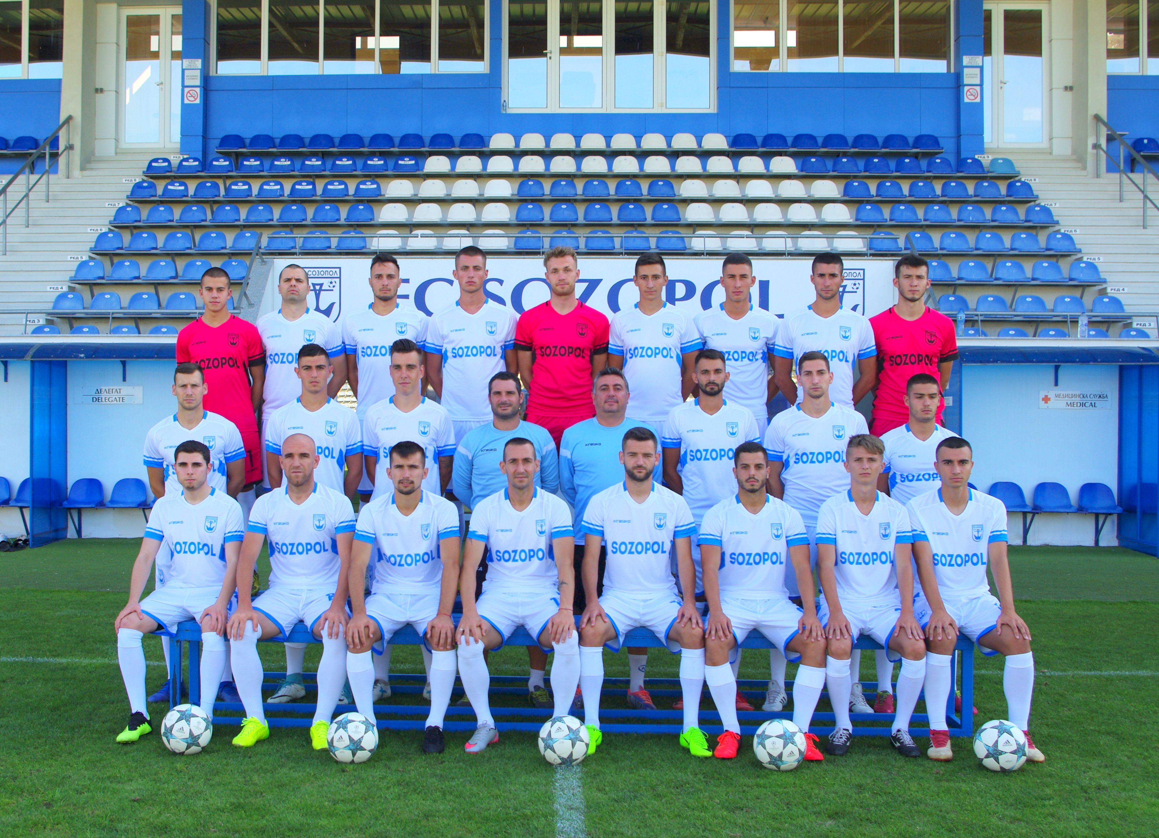 Созоплл